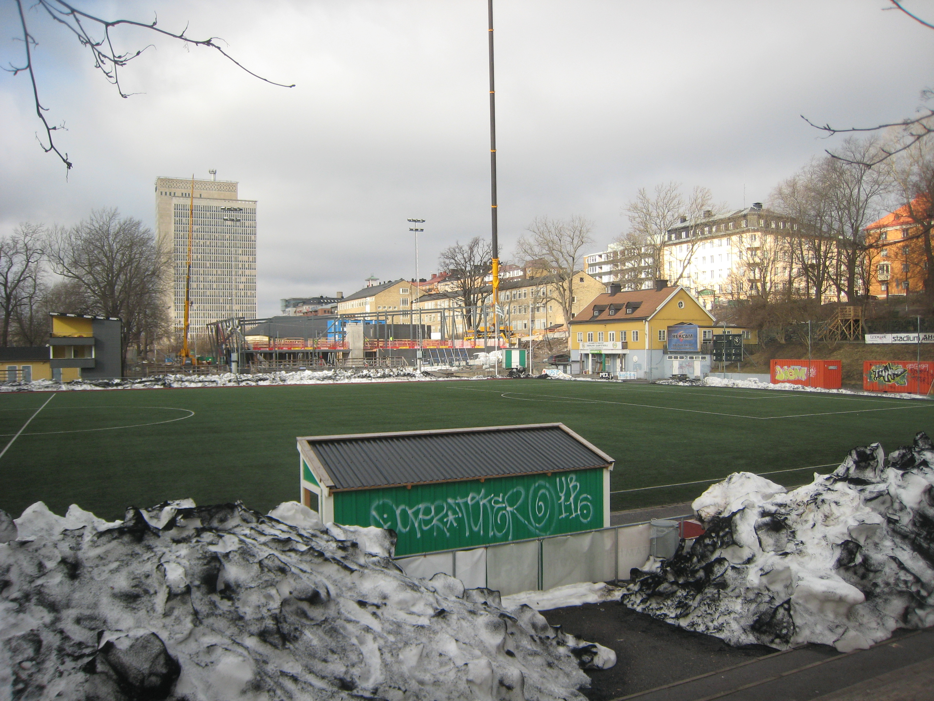 Hammarby IP